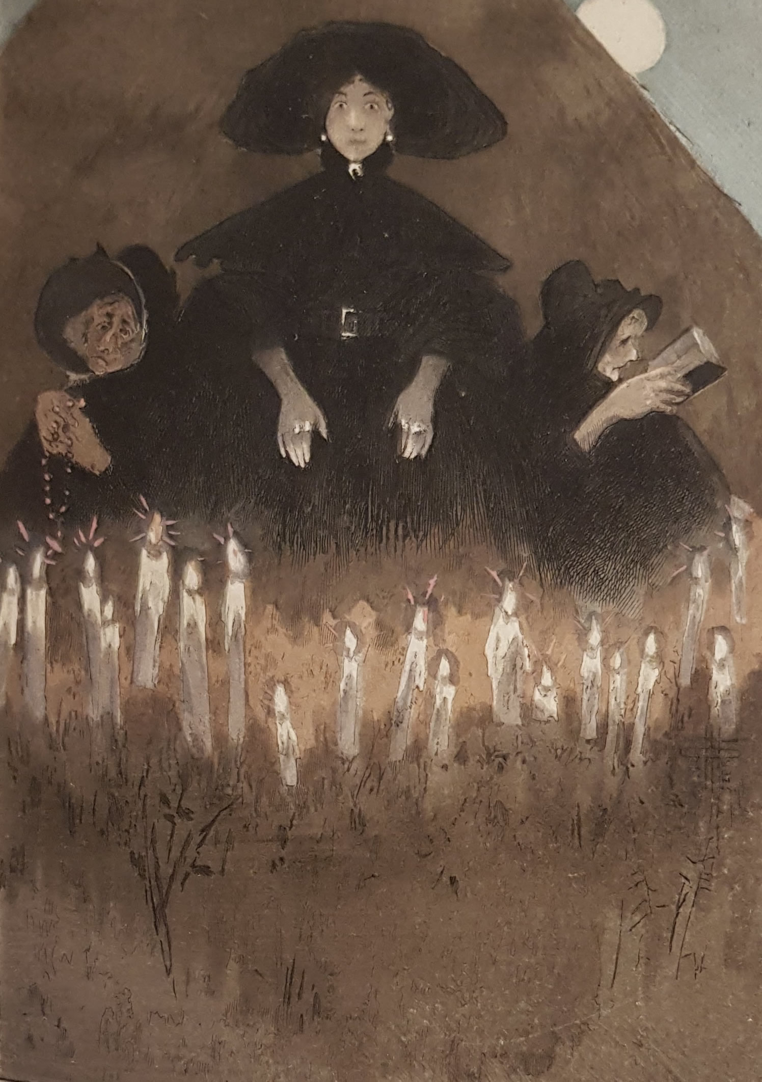 Acuarelleby Manuel Orazi done for the edition of "Ma petite ville" by Jean Lorrain in 1989